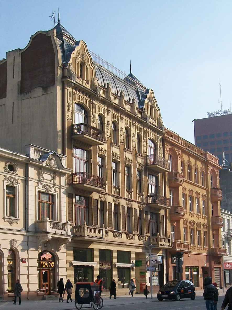 Piotrkowska 128 Łódź Kamienica Schichtów o secesyjnej elewacji autorstwa Gustawa Landau-Gutentegera 2011 MZW 2143